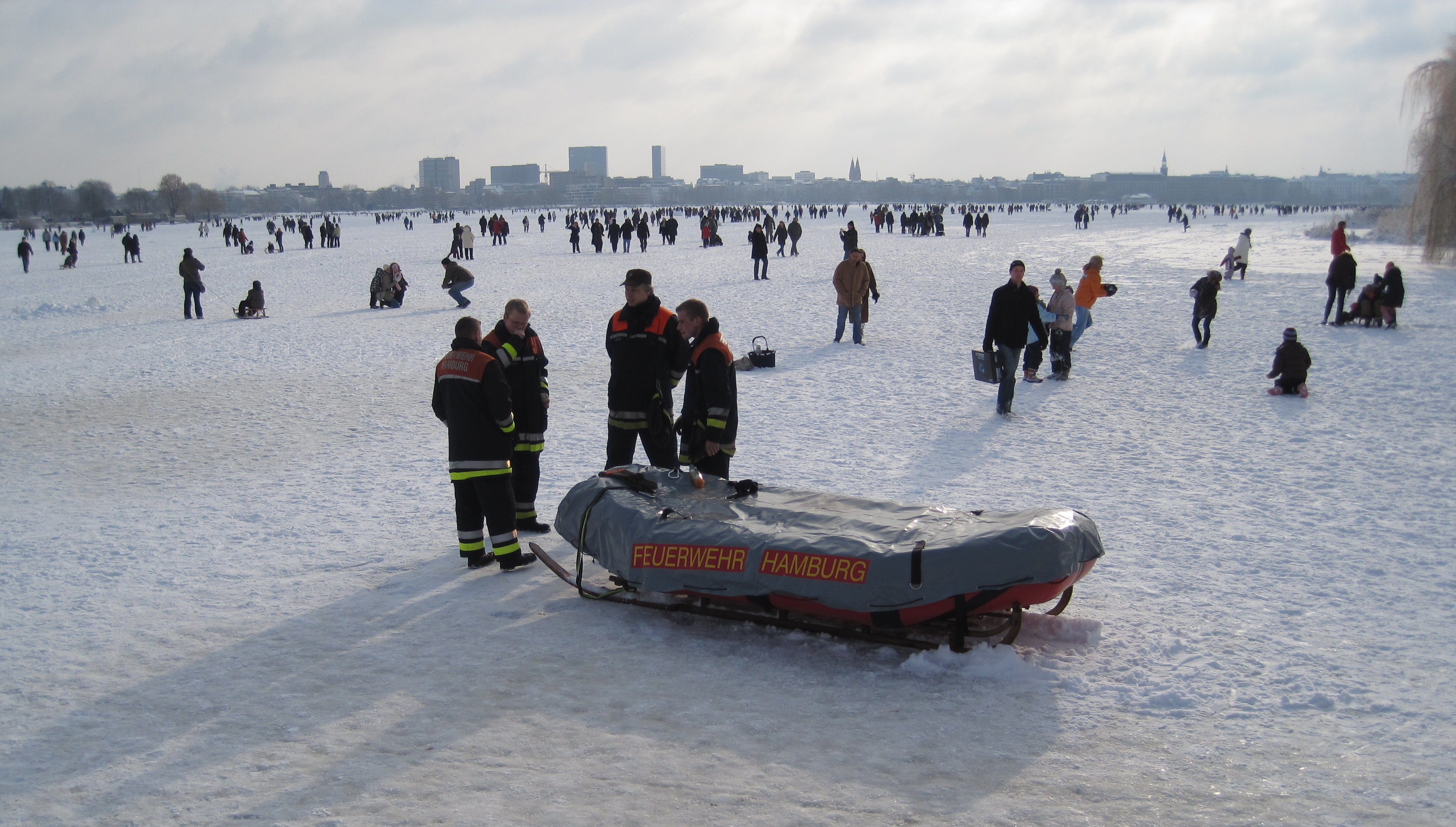 Hamburger Feuerwehrboot auf der Alster